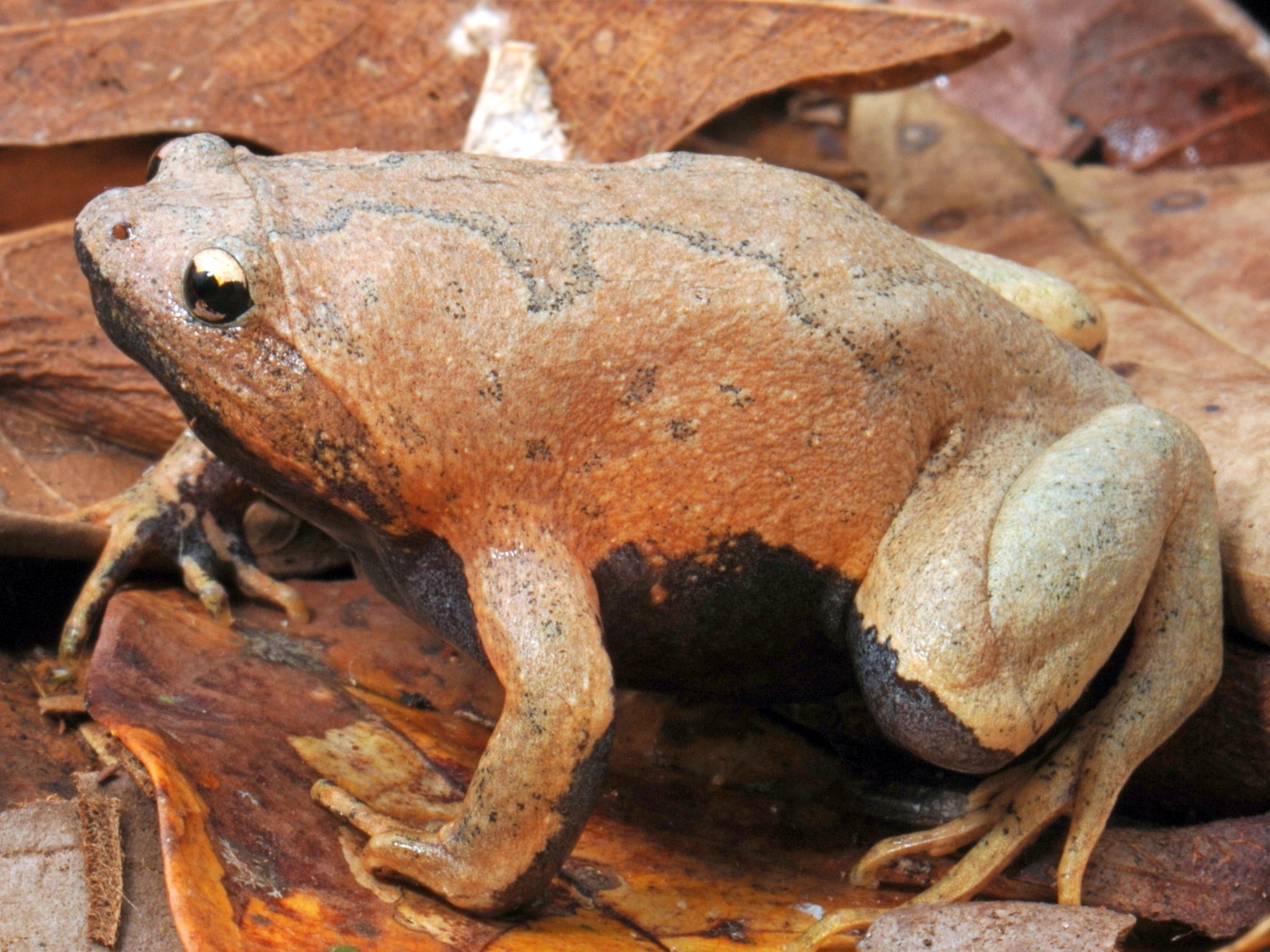 Rã do folhiço - Stereocyclops incrassatus - Espécie difícil de ser observada, é encontrada no chão da floresta após muita chuva.